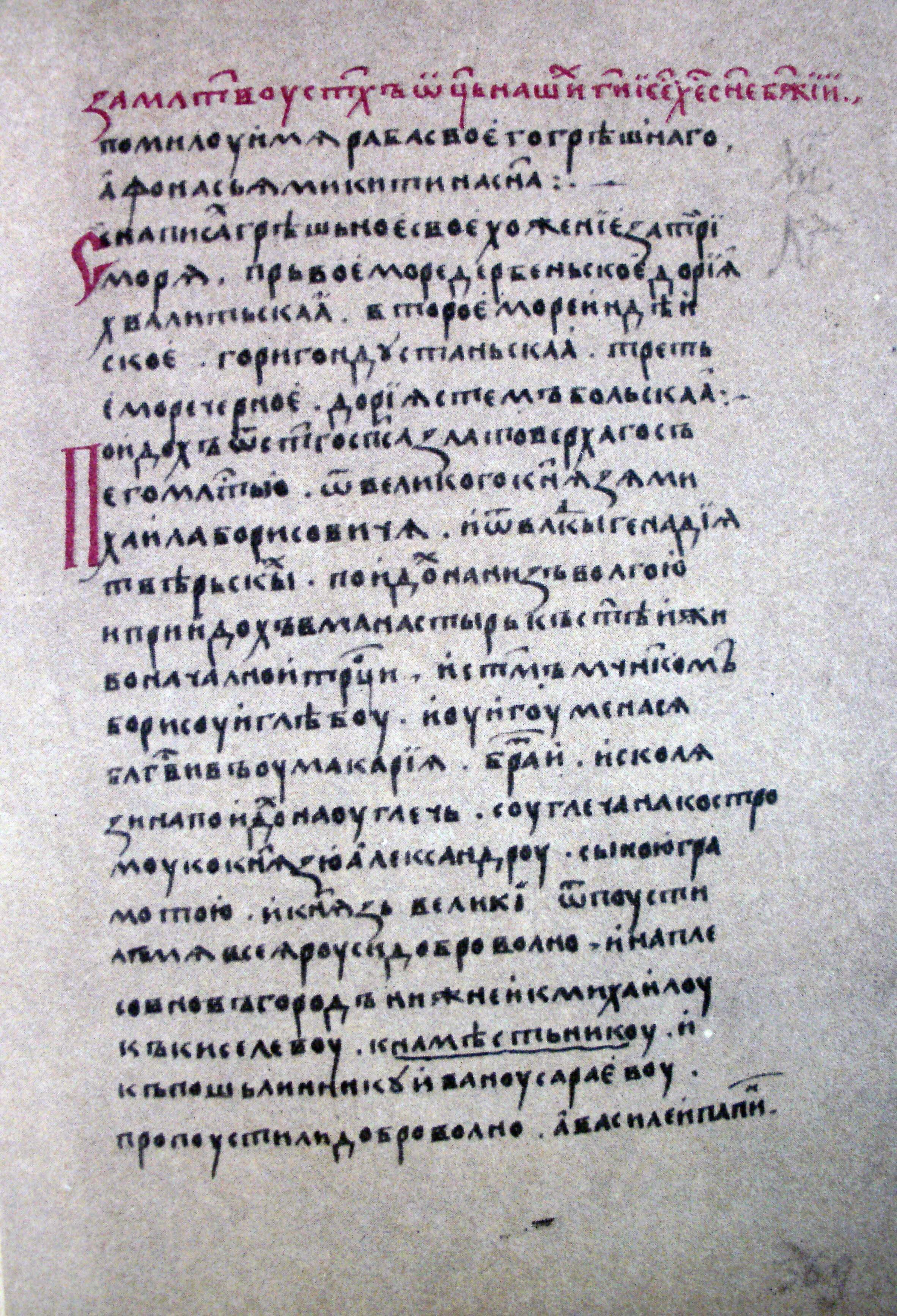 Факсимиле первой страницы рукописи по Троицкой Летописи. Взято из книги Путешествие Афанасия Никитина, 1988